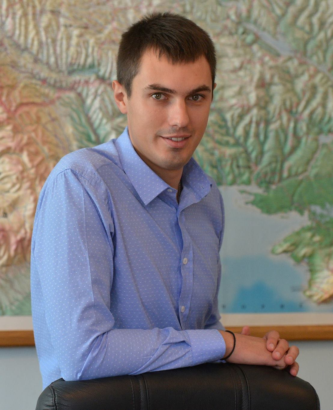 Вадим Гулько